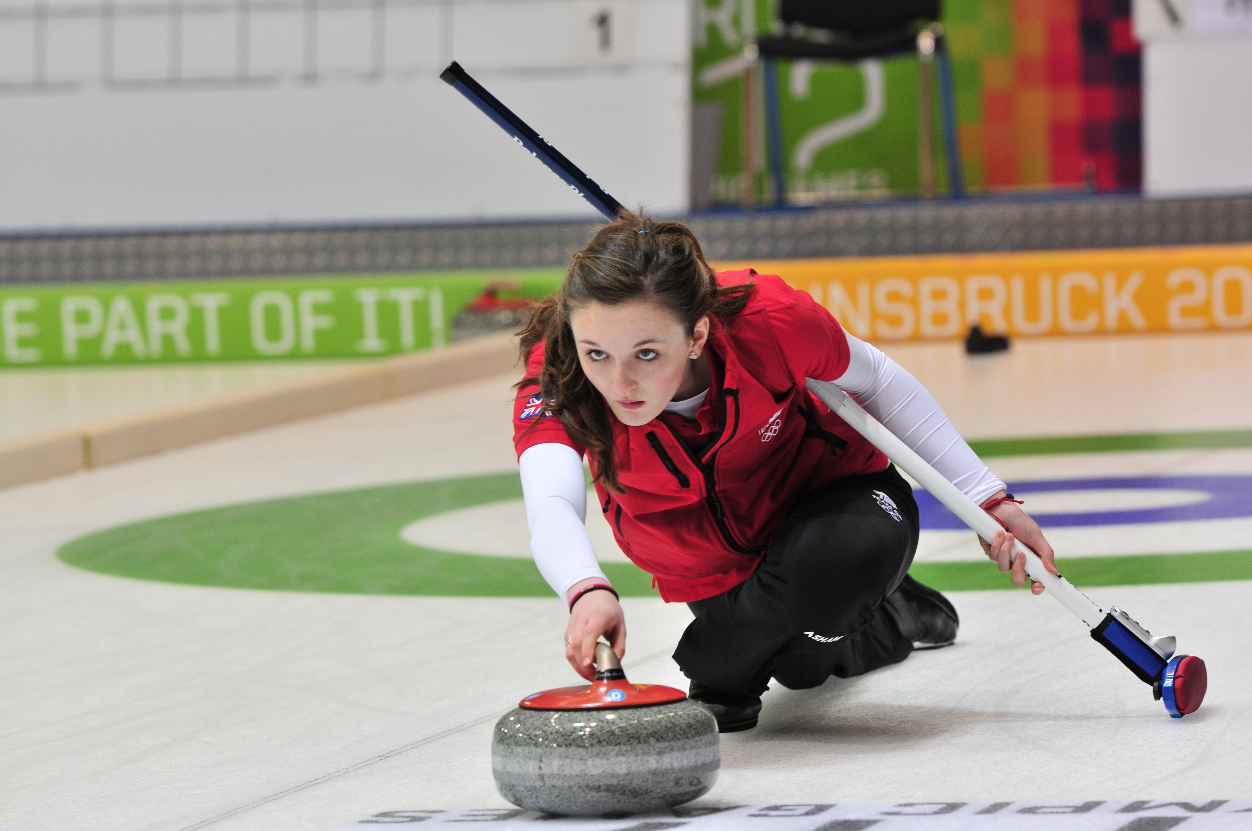 1. Jugendolympiade 2012 Innsbruck Erste Olympische Jugend- Winterspiele 201213. bis 22. Jänner in Innsbruck Dieses Foto wurde durch die Unterstützung von Wikimedia Österreich und die Twoonix Software GmbH ermöglicht.